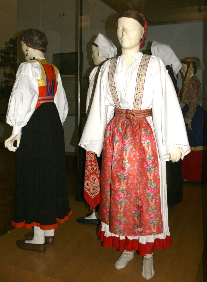 snimljeno tijekom Noći muzeja u Etnografskom muzeju u Zagrebu